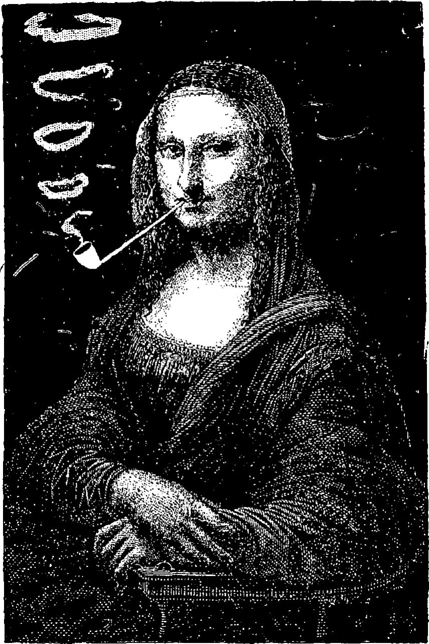 Scan de la page 5 du livre de Coquelin Cadet. Illustration reprenant un thème utilisé pour l'exposition des Arts Incohérents de 1883.